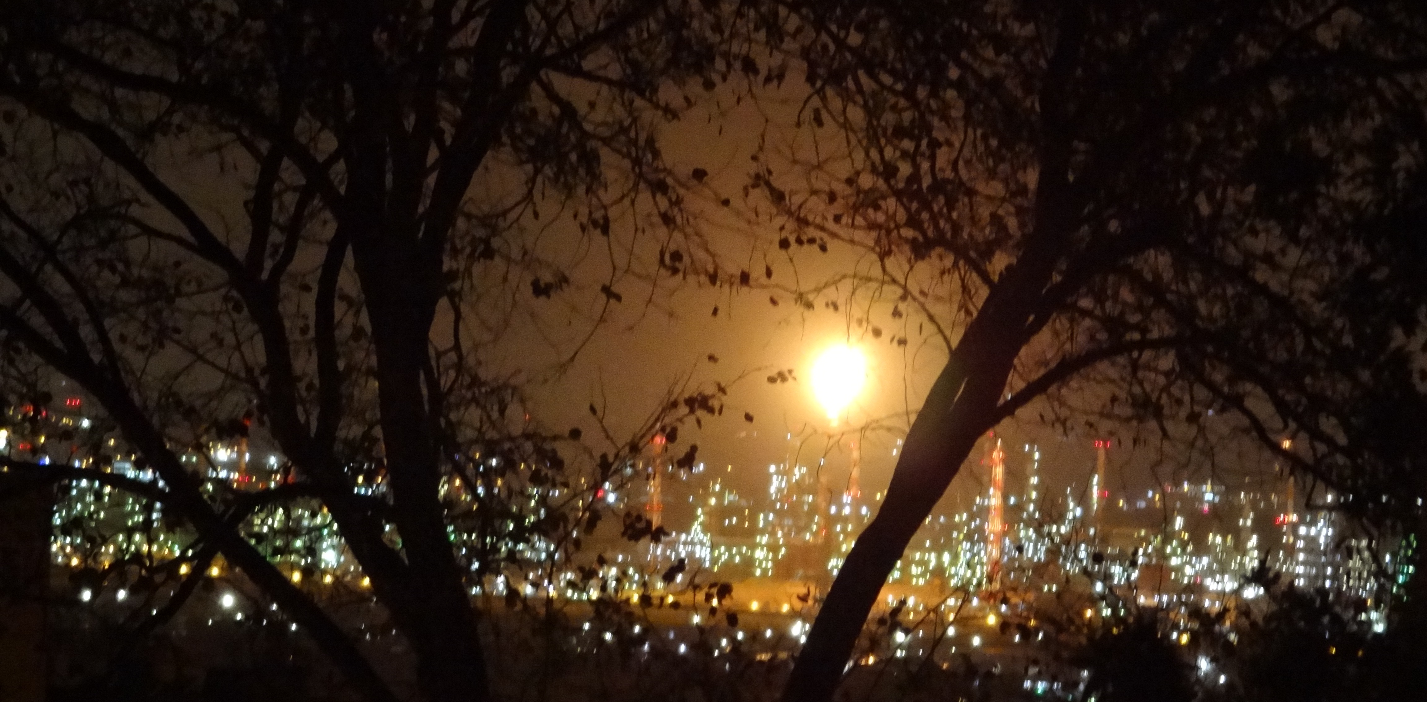 לפיד בתי הזיקוק בחיפה בוער לגובה רב בעקבות שריפת גזים שהצטברו כפי שהוא נראה משכונת גבעת נשר בעיר נשר